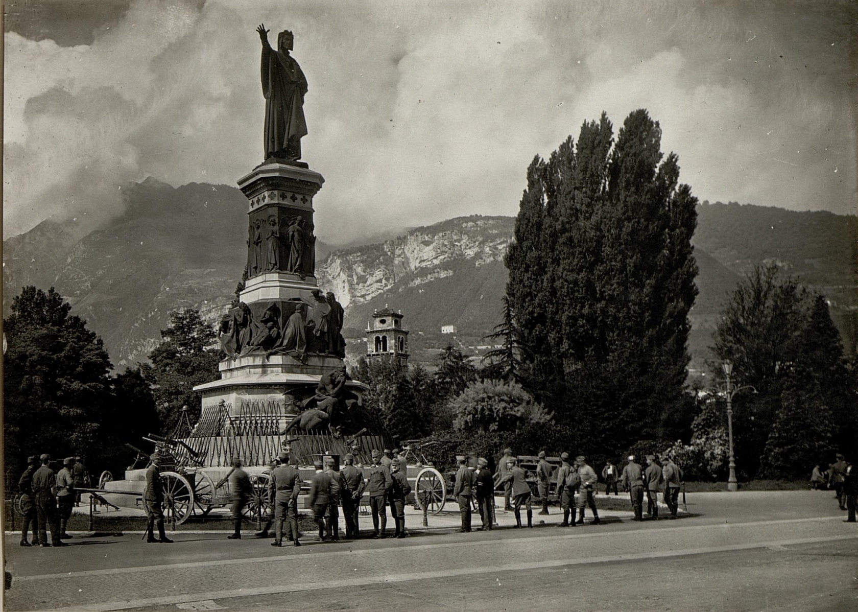 Dante Denkmal mit italienischen Waffen in Trient.